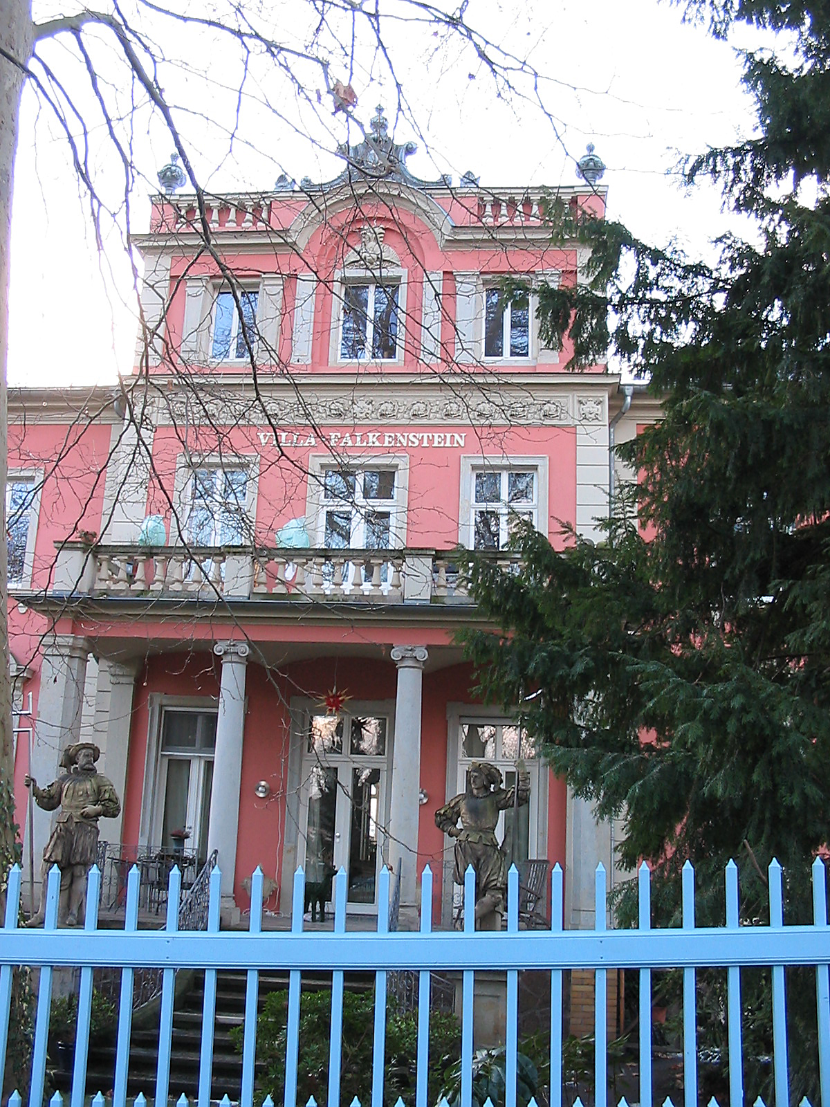 Radebeul, Villa Falkenstein, Mittelrisalit